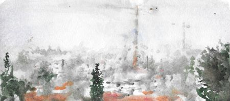 יום אביך אקוורל, מתוך קיר אמן פוגה